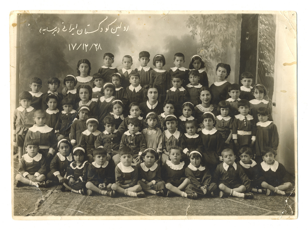 نخستین کودکان ایران-کودکستان برسابه هوسپیان1328 (1949A.D.)